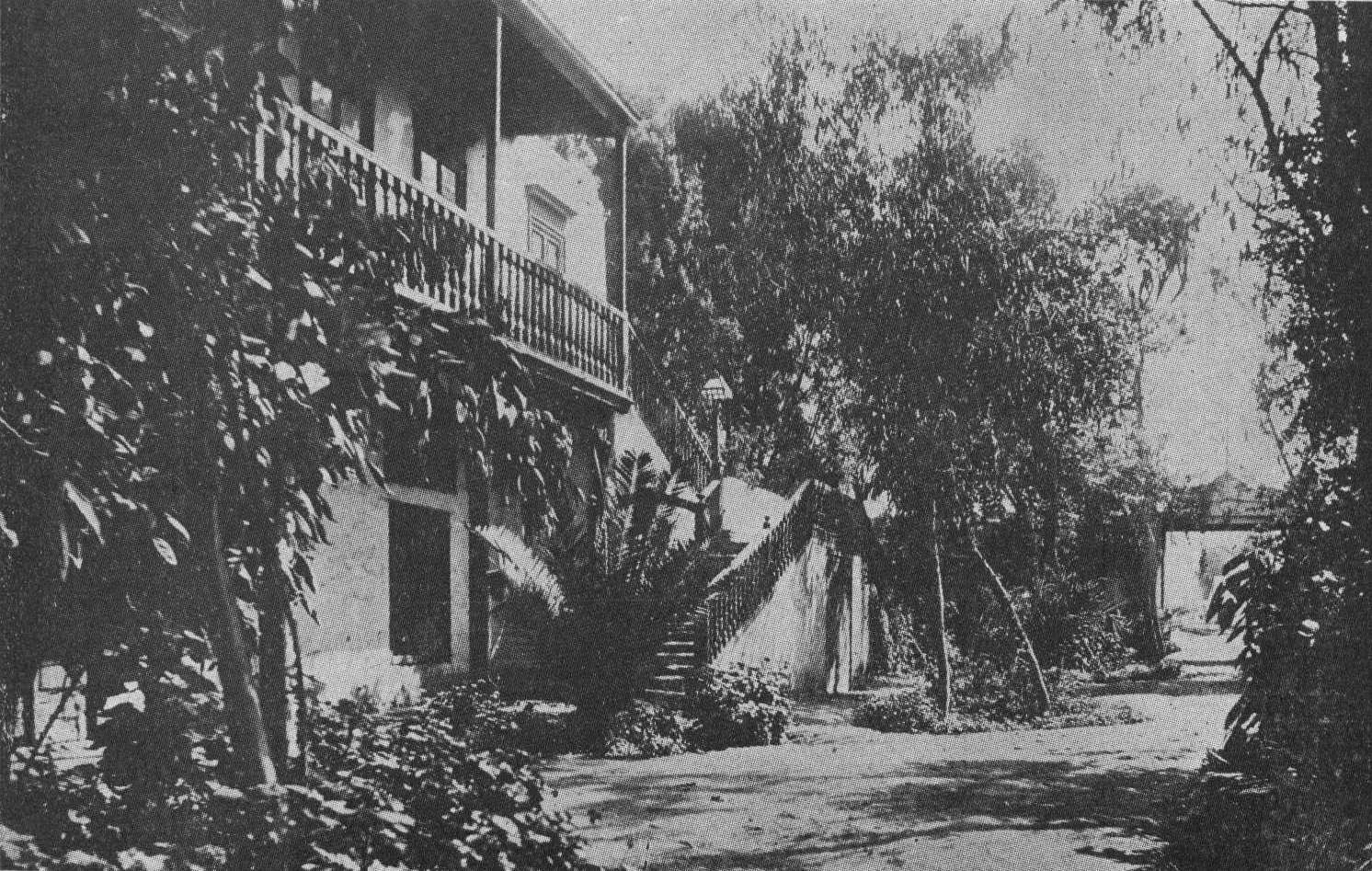 Fotos antiguas de Magdalena Vieja (Pueblo Libre), publicadas antes de 1931 en las revistas Mundial y Variedades